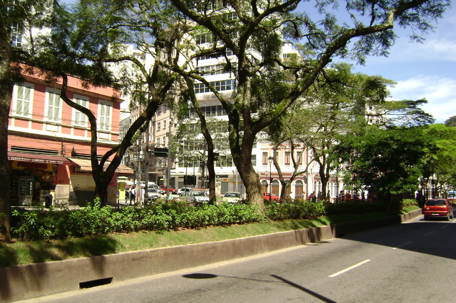 "Cidade Imperial": Petrópolis, RJ, Brasil.